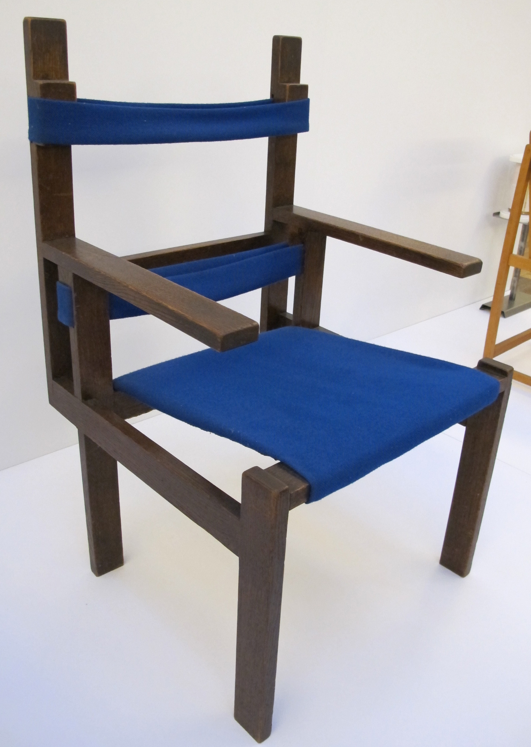 Marcel breuer, sedia, 1924